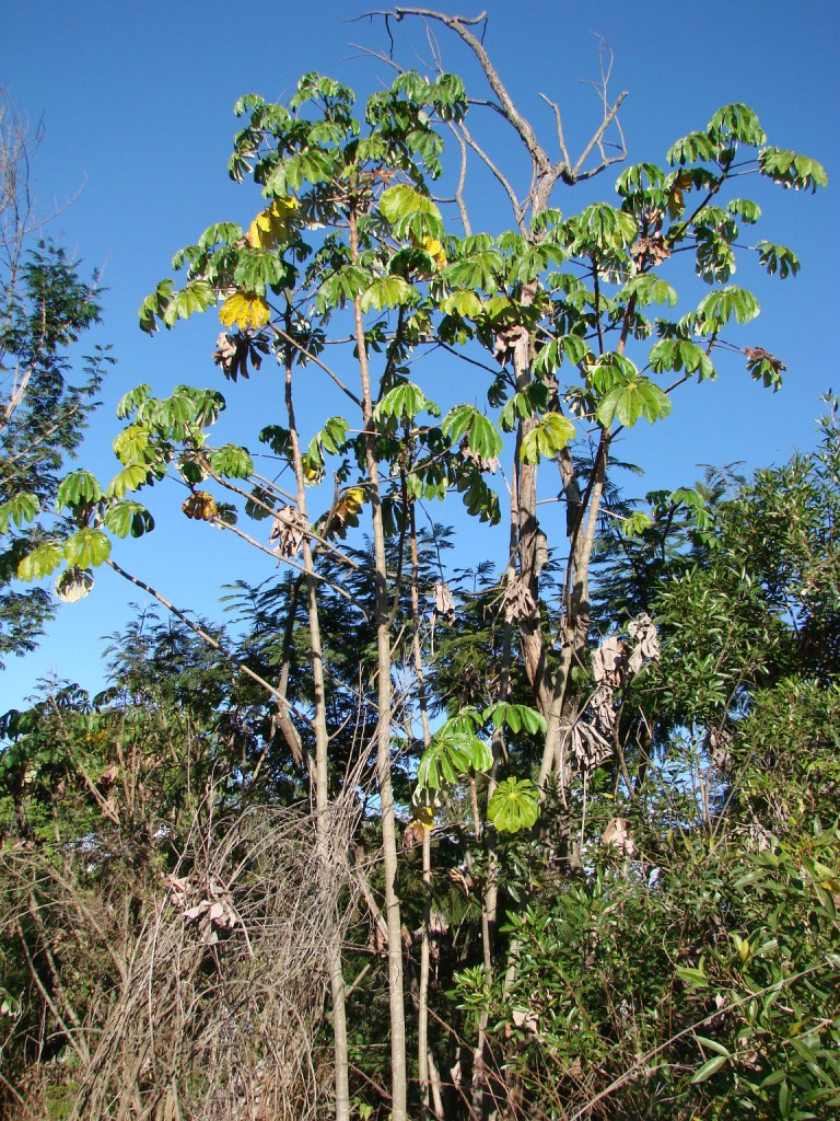 Cecropia pachystachya Trécul - URTICACEAE - tem como sin. het. Cecropia carbonaria, Cecropia catarinensis, Cecropia lyratiloba - Parque Olhos D'Água - Brasília - Distrito Federal - Brasil.